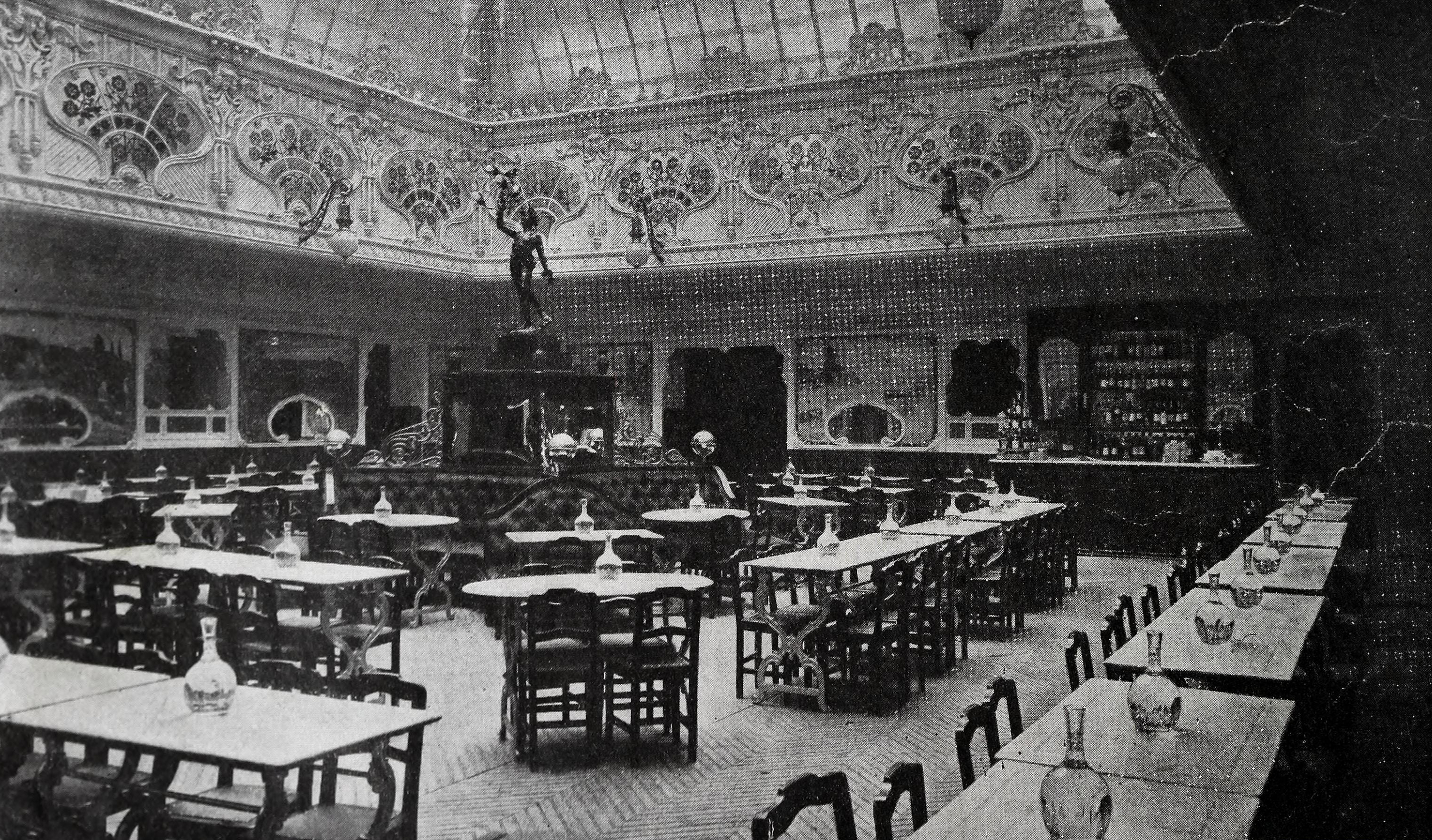 Fotografía del suntuoso salón central del Café de Madrid, inaugurado recientemente.